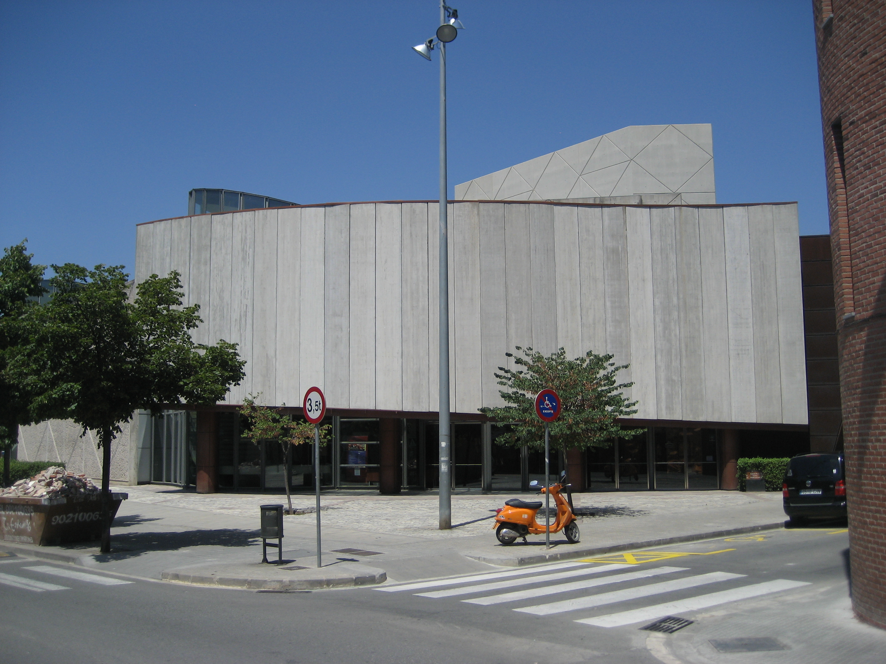 Teatre Auditori de Granollers (Vallès Oriental).